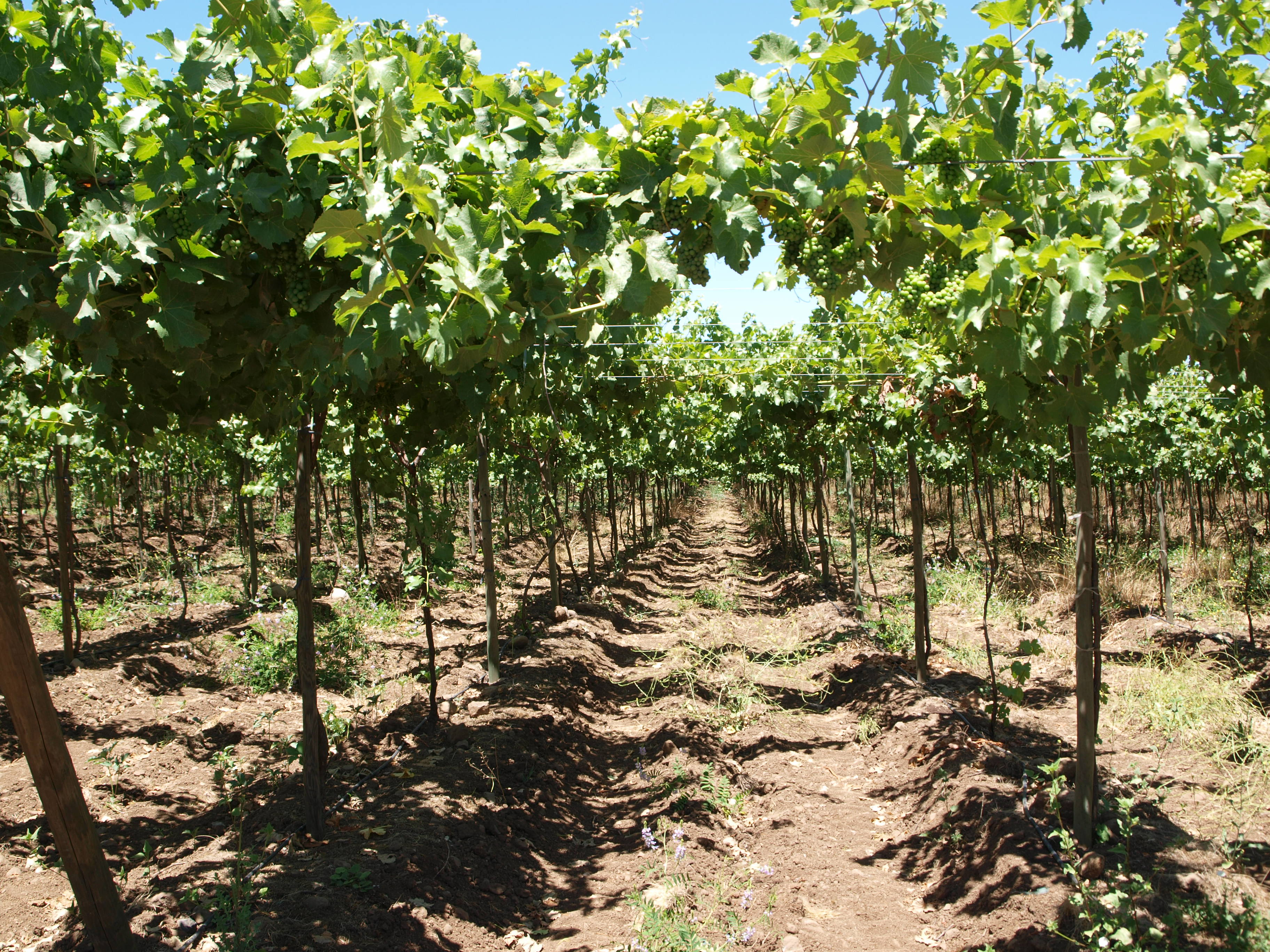 Reberziehungsystem Pergola in Chile - dort Parron genannt